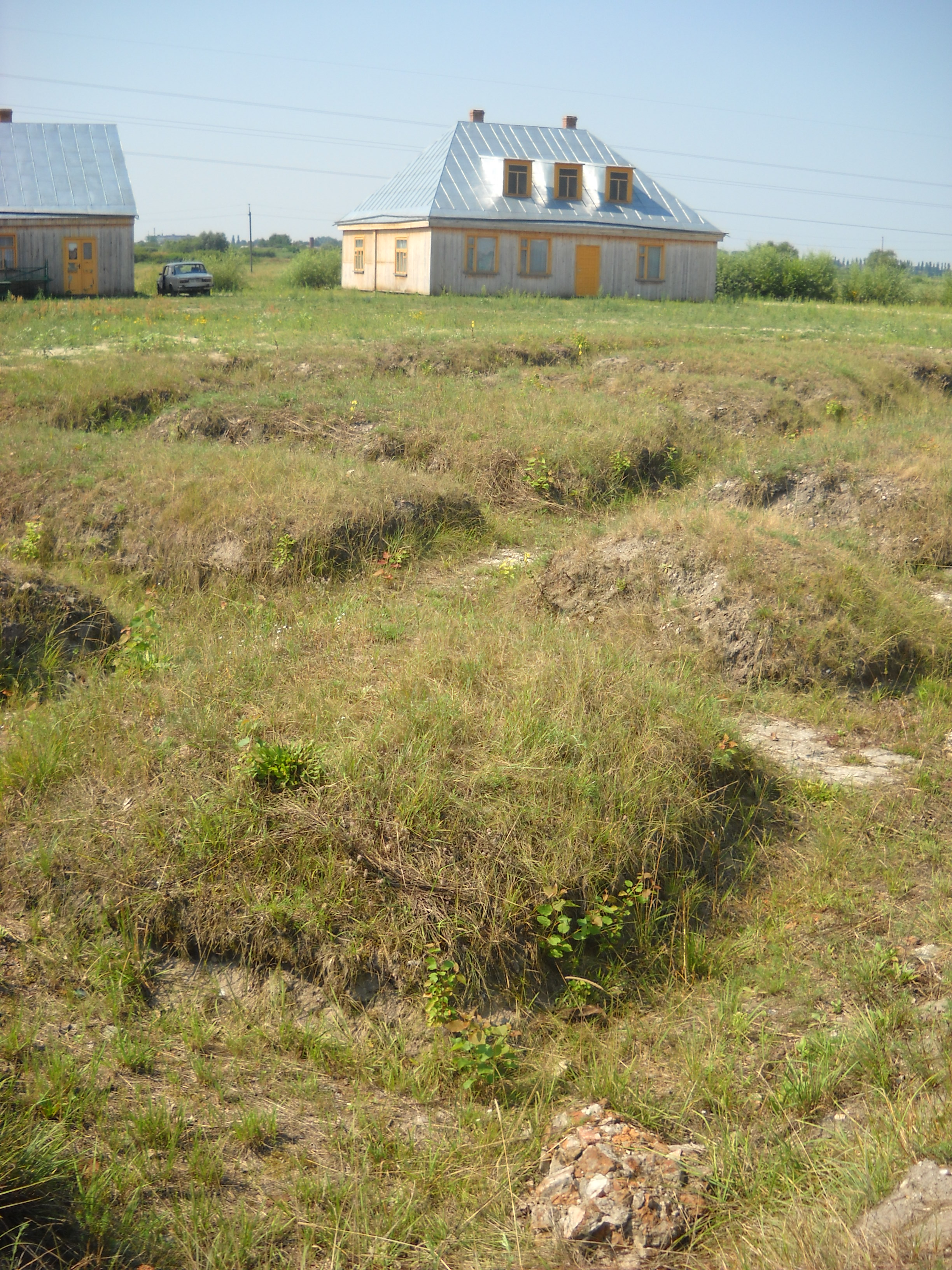 Pozostałości po prawosławnym klasztorze Trójcy Świętej i zabudowania zbudowanego na jego miejscu monasteru Narodzenia Jana Chrzciciela. Wieś Werba k. Kowla